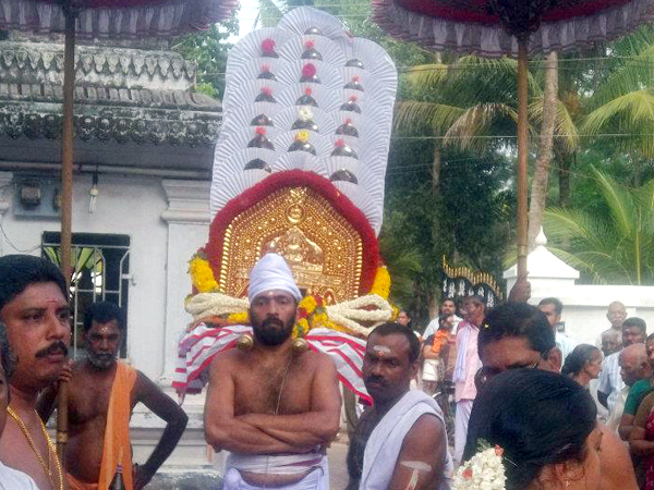 Bhagavathippara